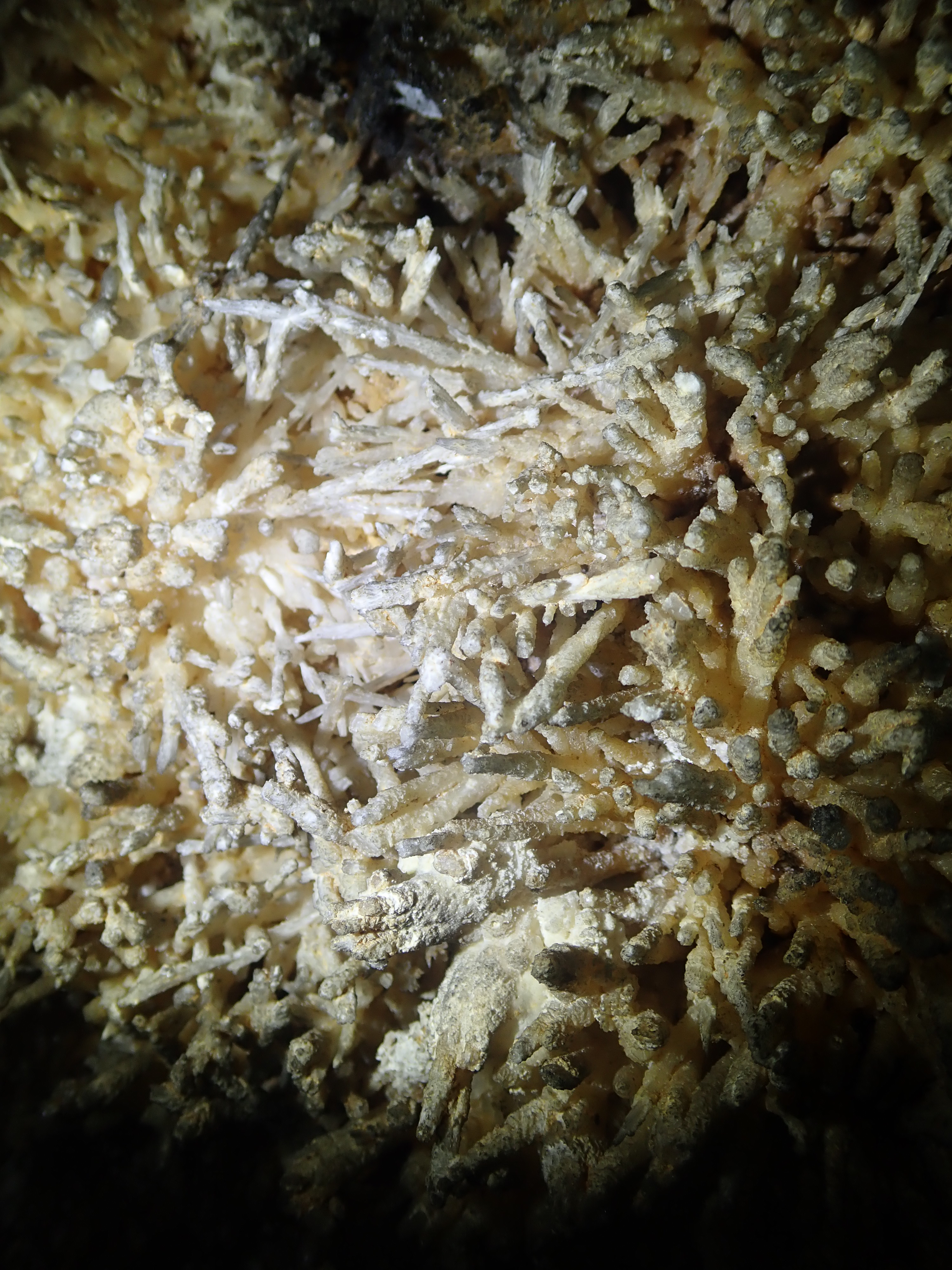 珍しい方解石